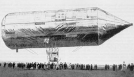 Schwarz Dávid 3280 m3 térfogatú, henger alakú és kúpos kiképzésű léghajója